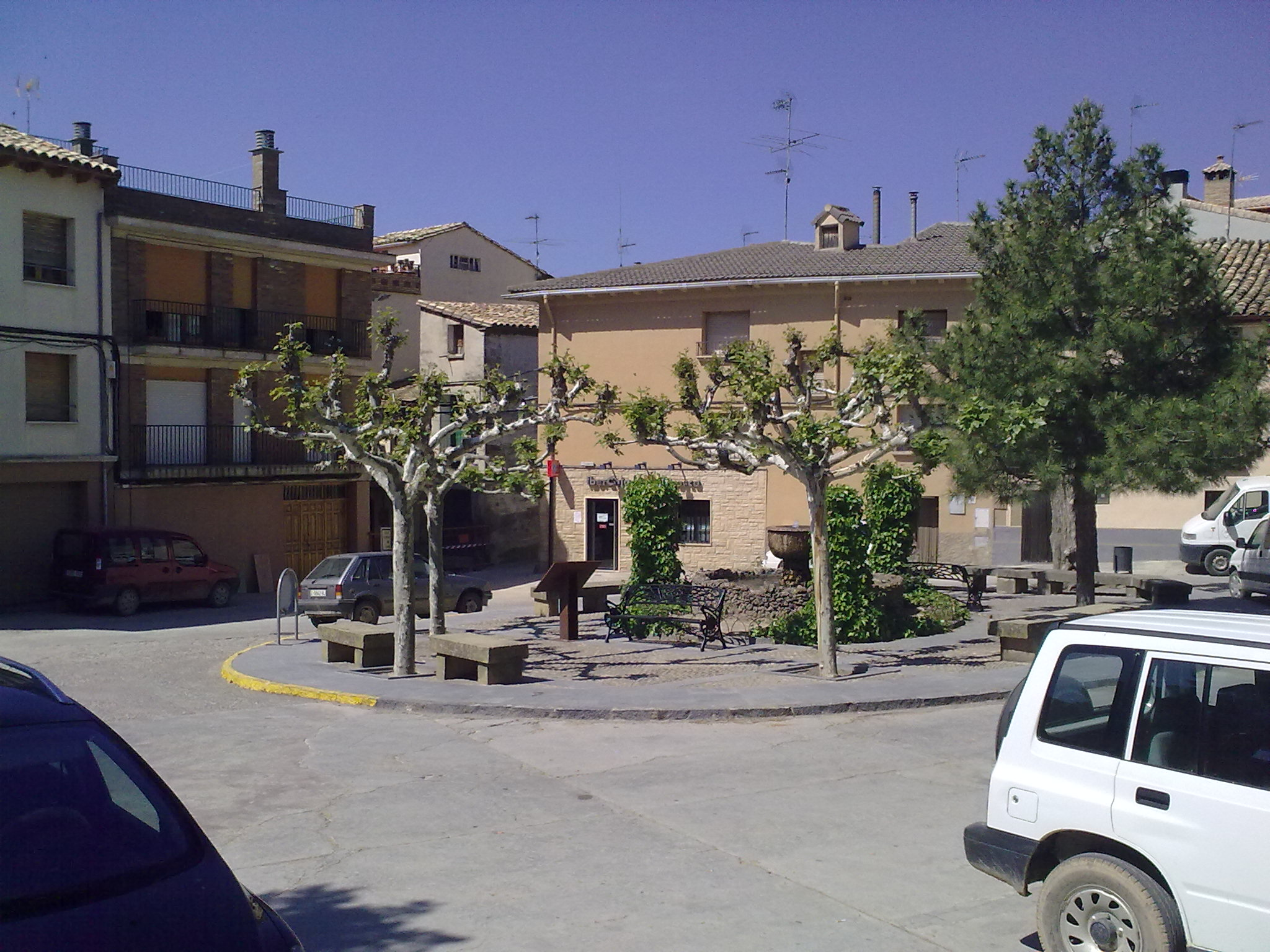 Loarre le 24 mai 2010. Espagne.